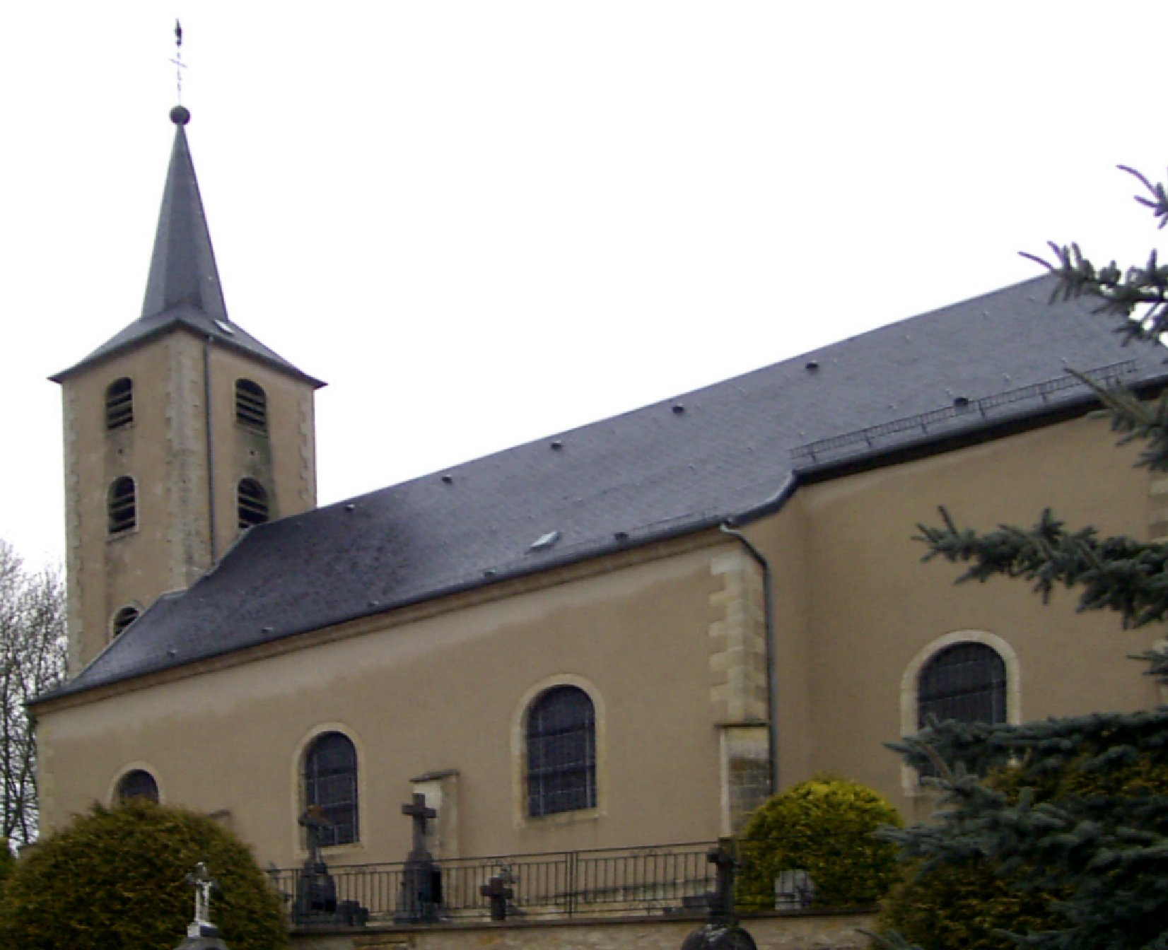 L'église Saint-Maurice à Kanfen-Keybourg